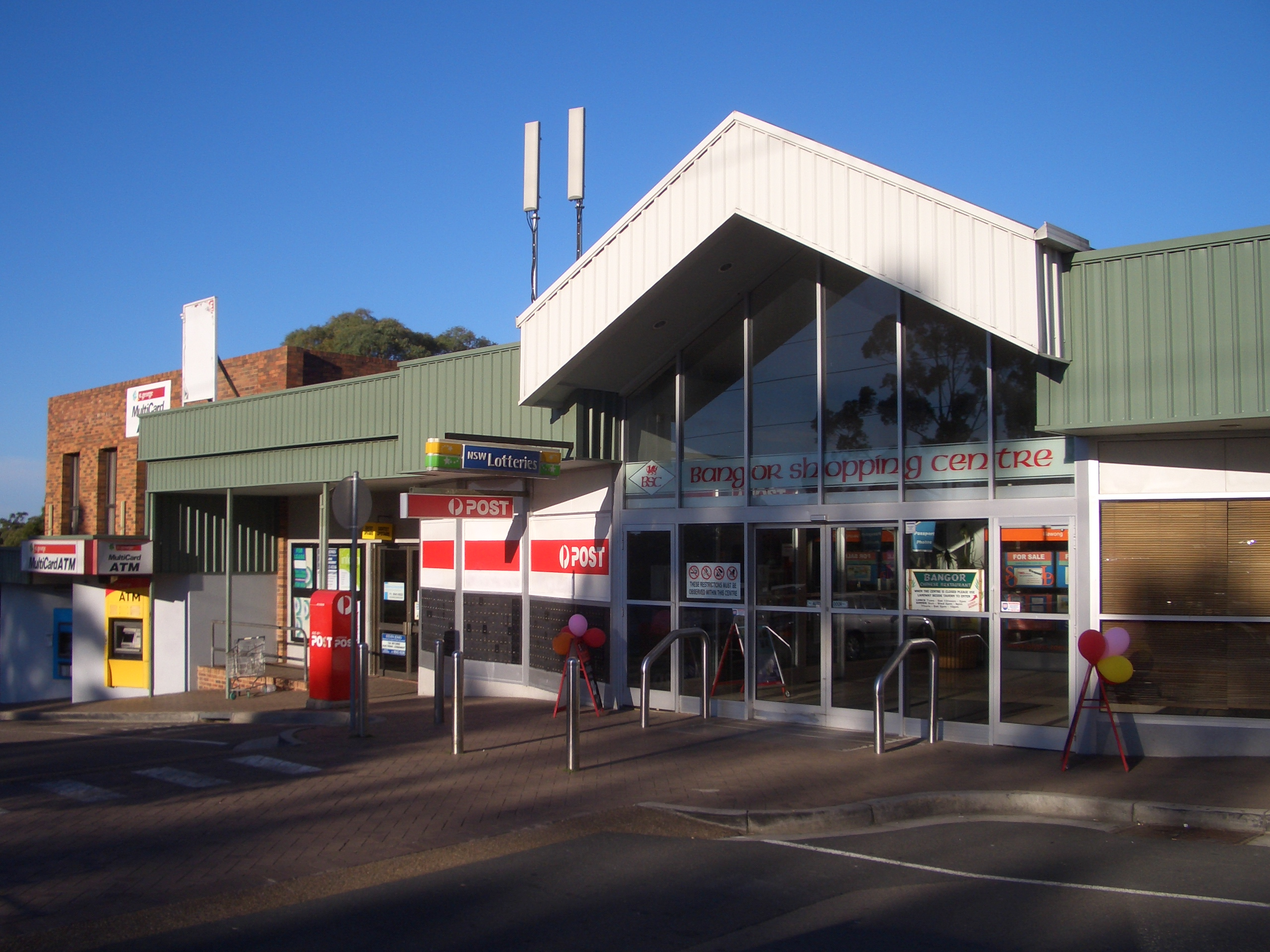 Bangor Shopping Centre